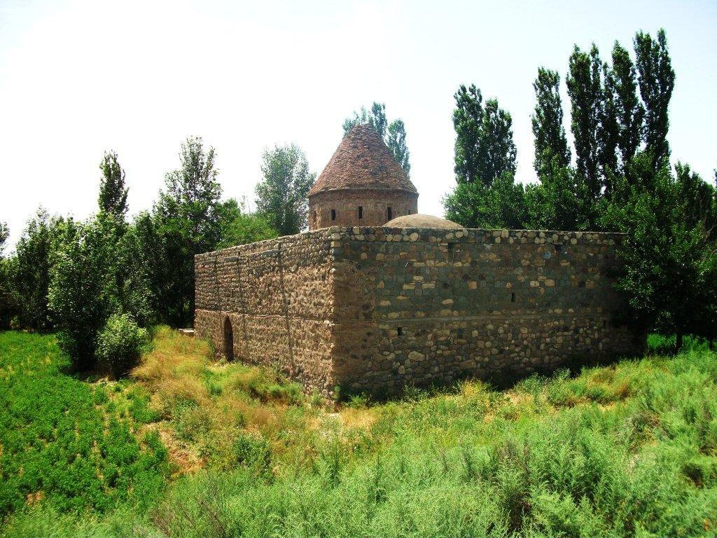 کلیسای قدیمی مهلذان.شهرخوی